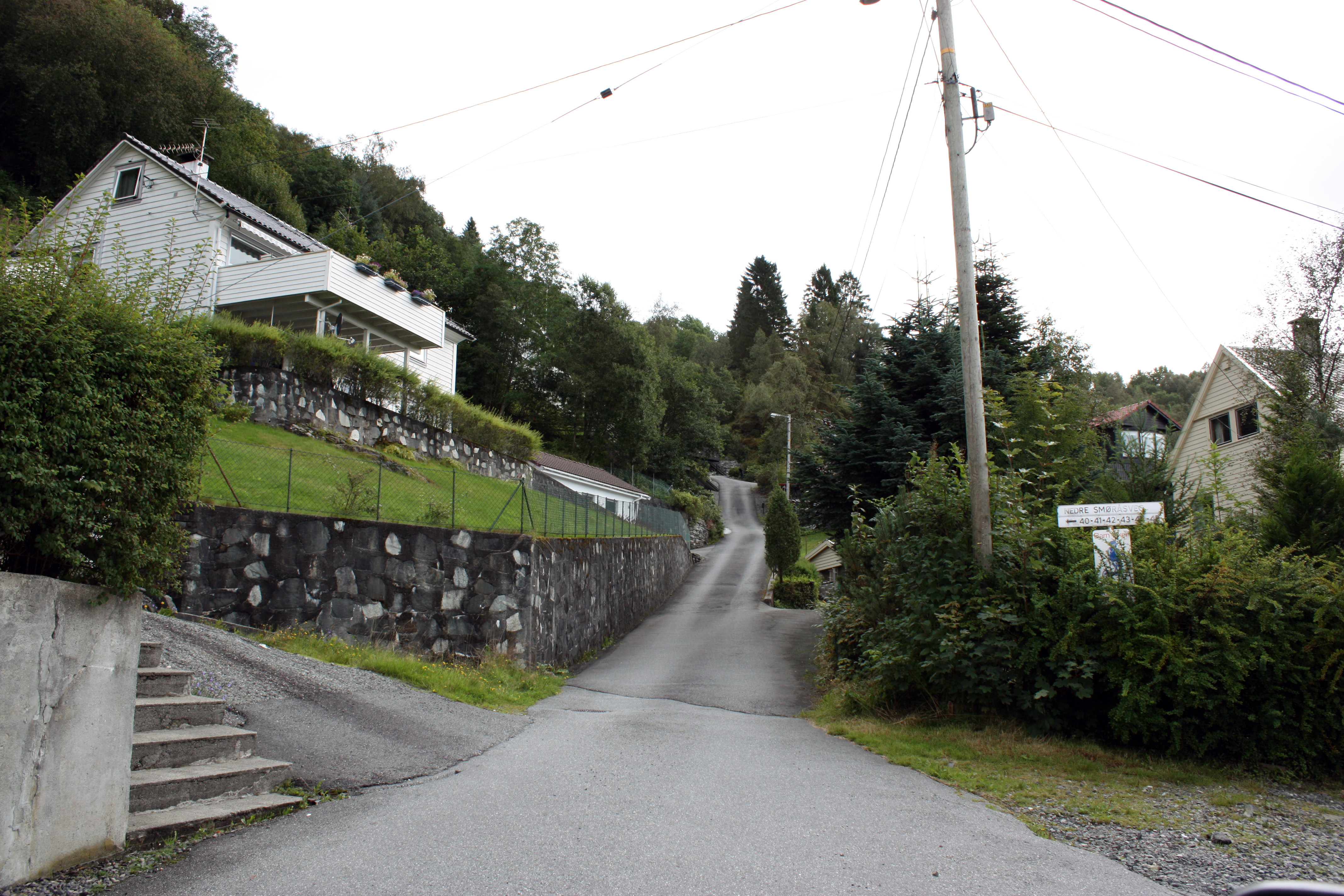 Nedre Smøråsvegen, Fana, Bergen. August 2009.